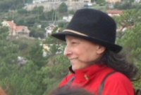 retrato